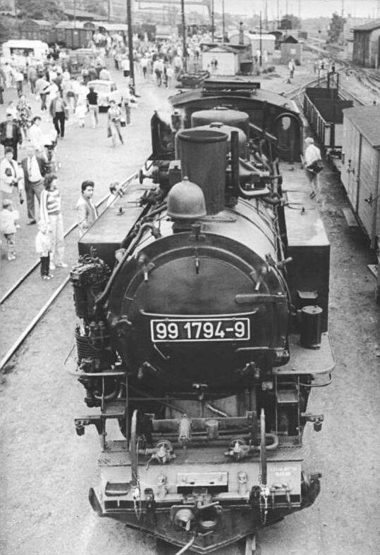 Dampflok 99 1794-9 (BR 99) ADN-ZB Häßler 19.7.8-pr-Bez. Dresden: Mit einem großen Bahnhofsfest in Radebeul wurde das 150jährige Jubiläum der Aufnahme des Eisenbahnverkehrs zwischen Dresden und Radebeul-Weintraube im Juli d.J. gefeiert. Diese Lokomotive der Kleinstbahnstrecke verkehrt noch heute zwischen Radebeul-Ost und Radeburg.